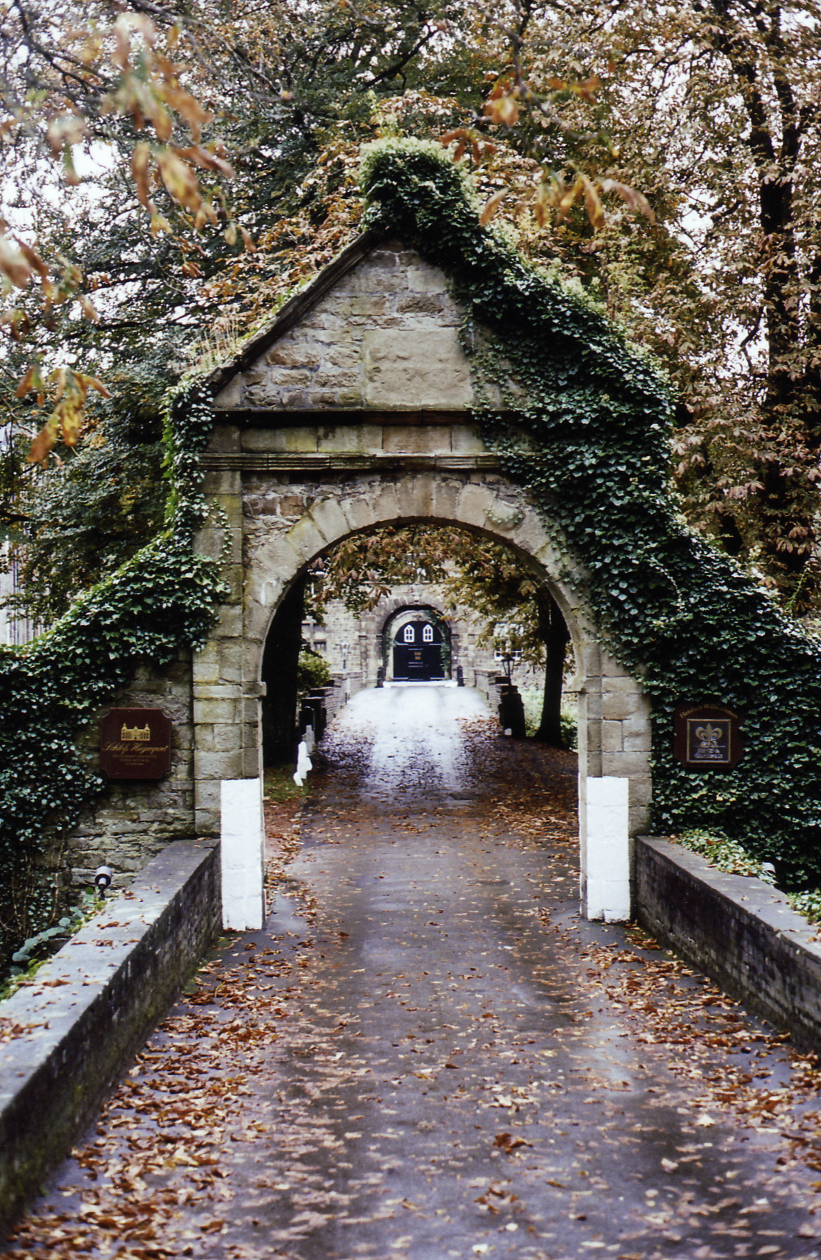 Portal der äußeren Vorburg des Schlosses Hugenpoet in Essen-Kettwig